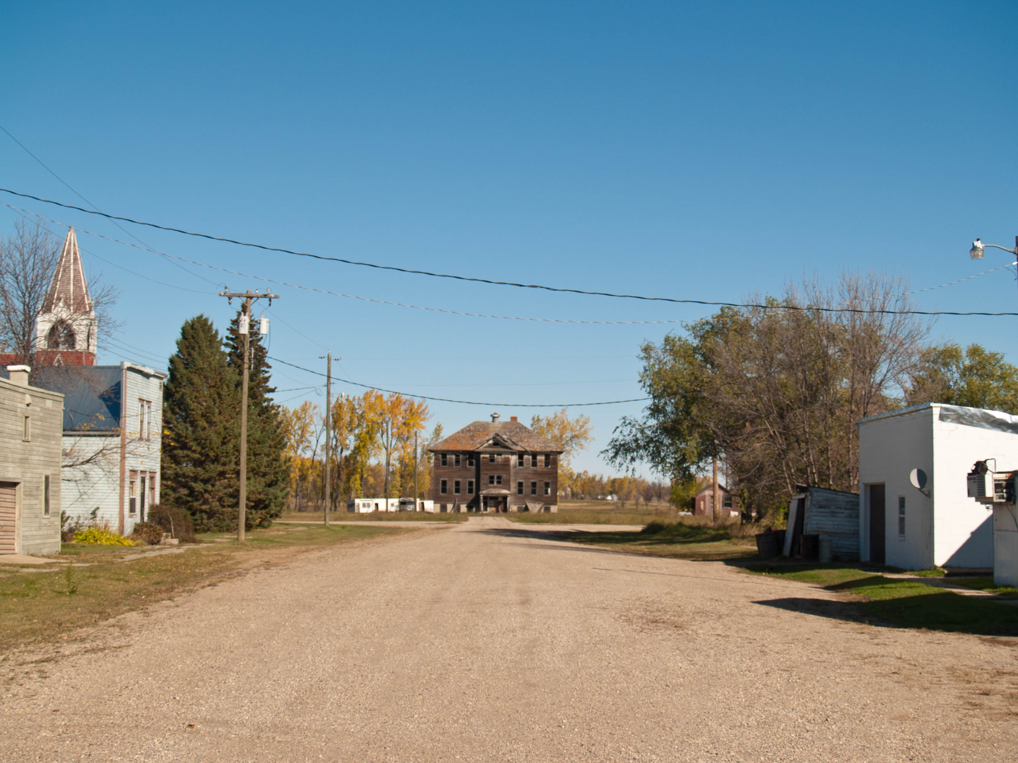 Hamberg, North Dakota